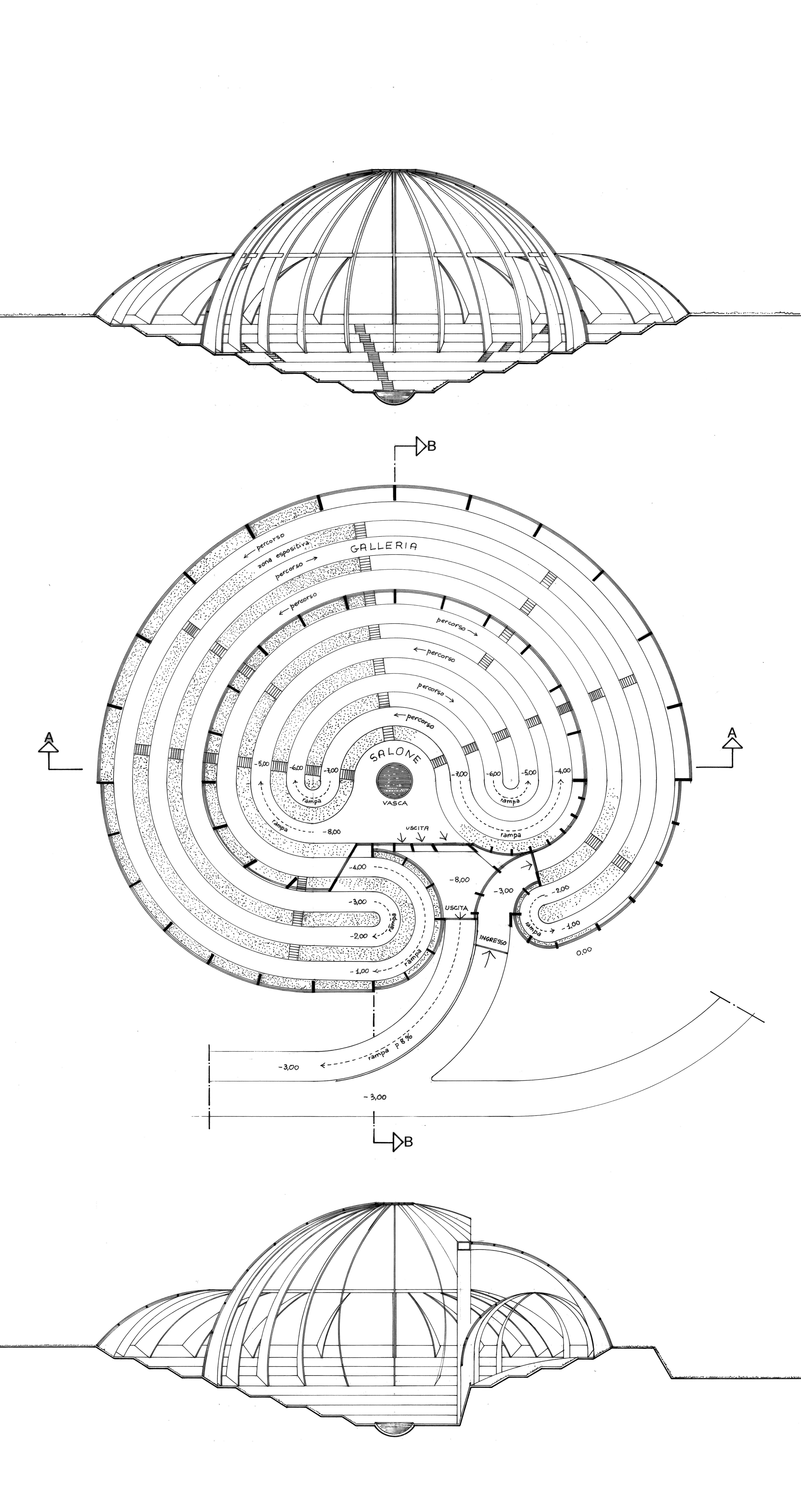 architettura del paesaggio, giardini